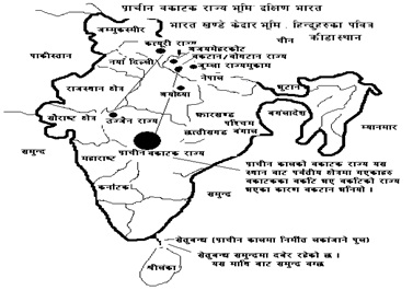 नेपाल भाषा: Wakatak kingdom